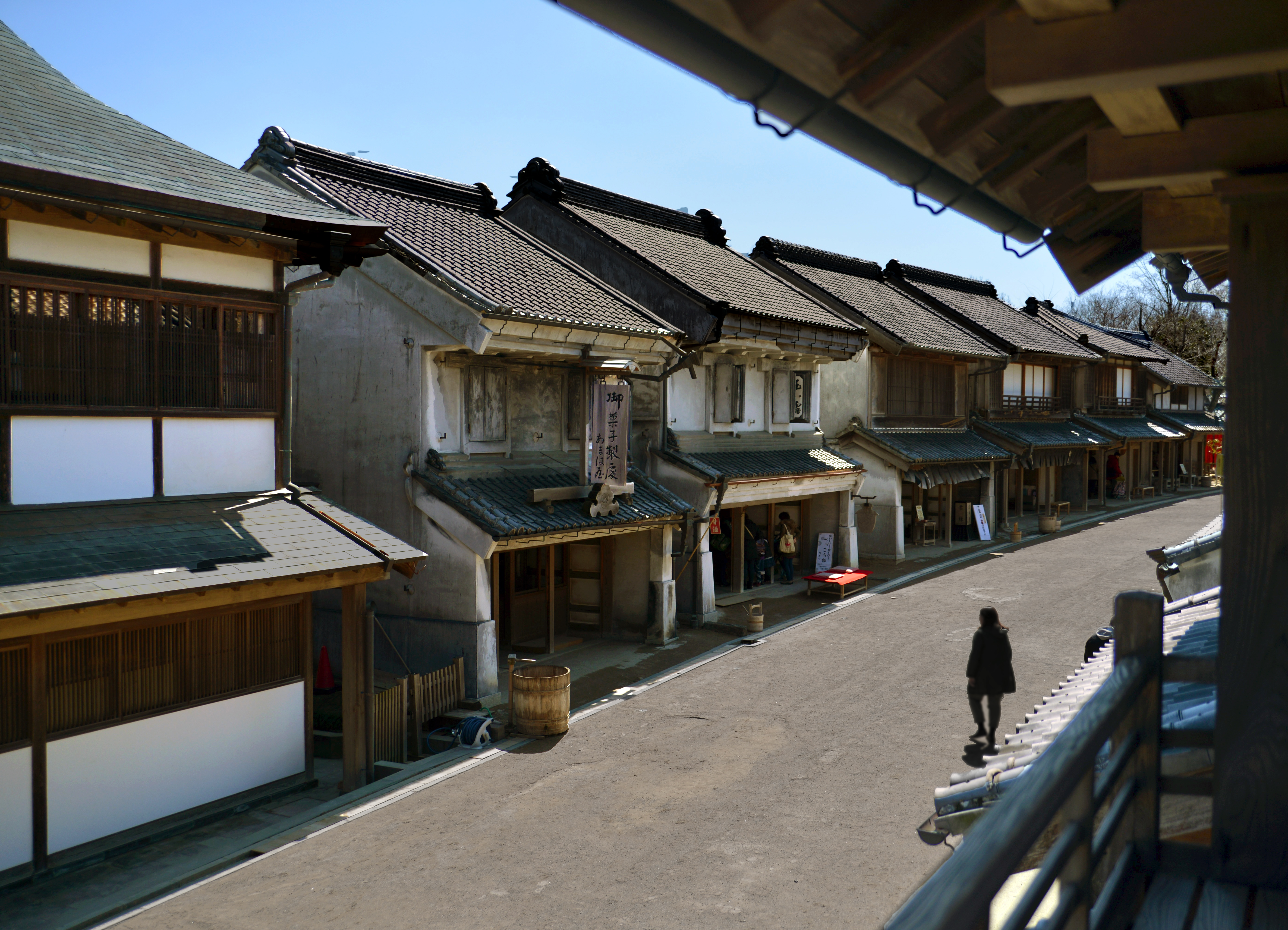 房総のむら・商家の町並。